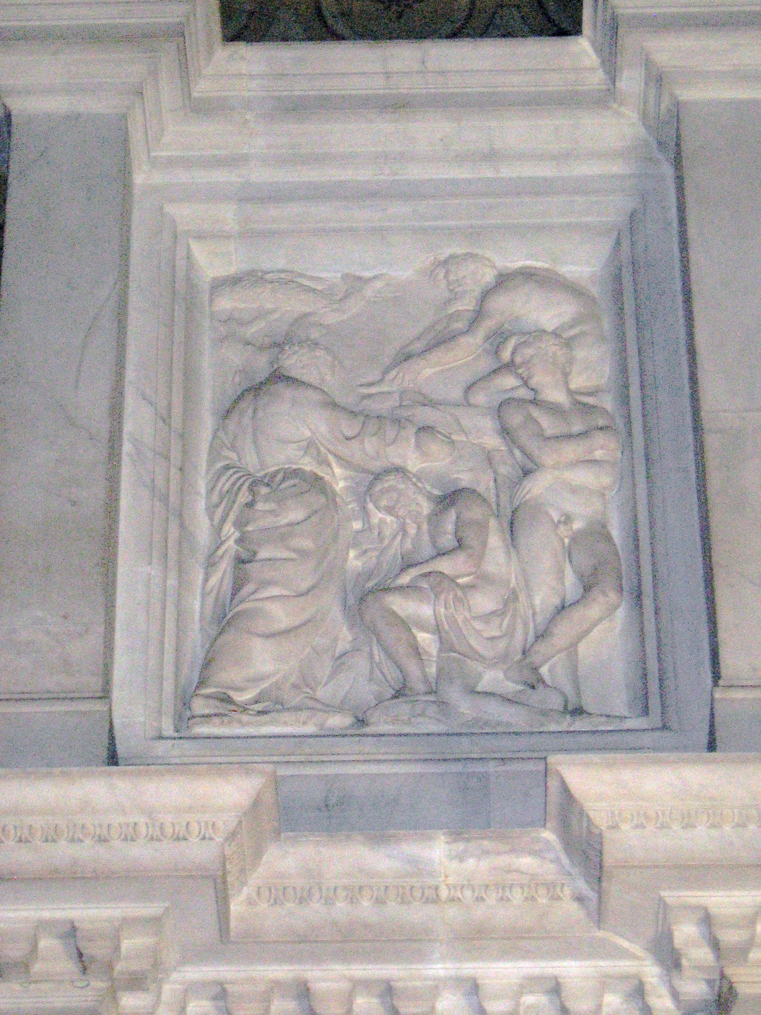 grafmonument van paus Leo X, relief links.